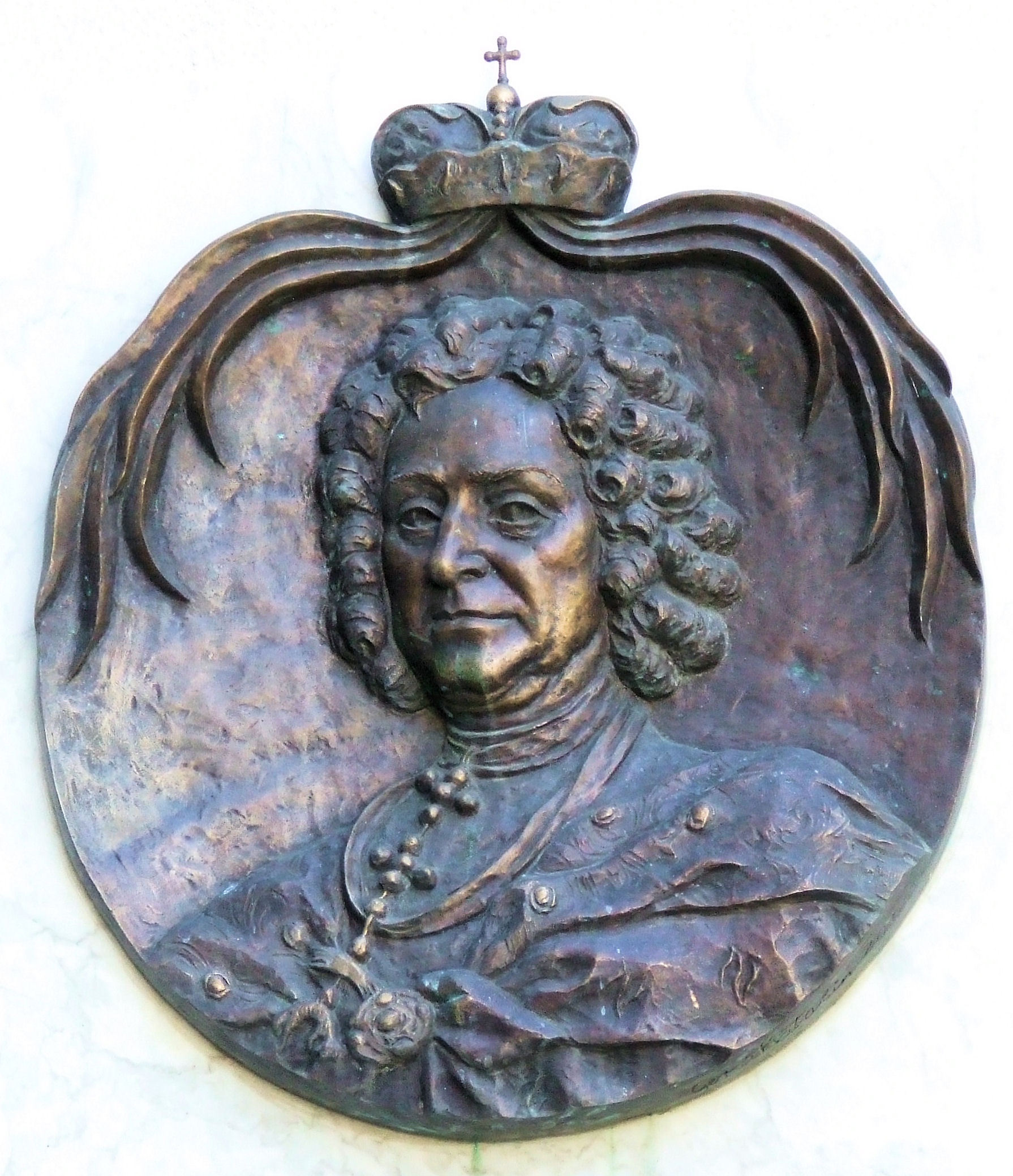 Esterházy Pál (1635–1713) nádor emléktáblája a kaposvári városháza falán (részlet). Gera Katalin festő- és szobrászművész alkotása (2004)